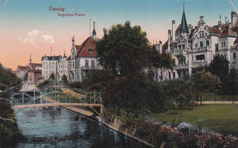 Gdańsk, park Mały Błędnik na Targu Rakowym.